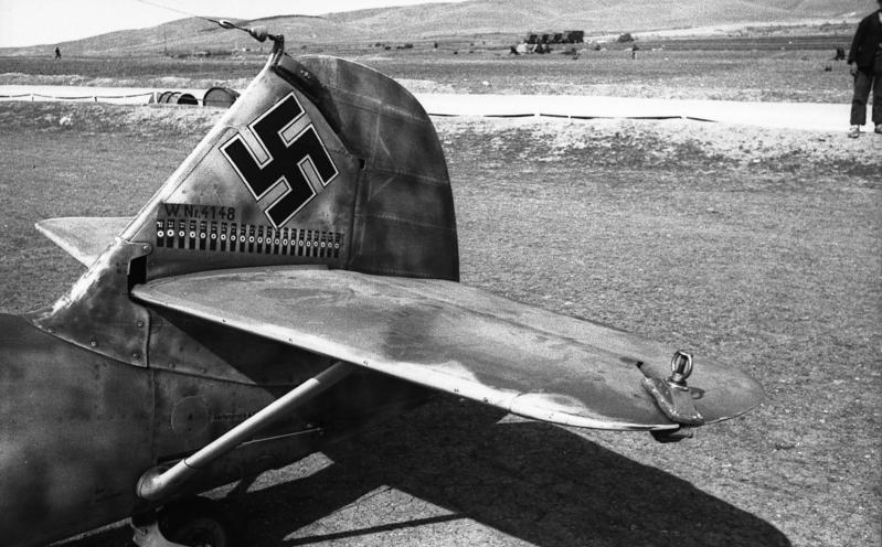 Information added by Wikimedia users.Heckleitwerk der Messerschmitt Bf 109 E-7 (Werknummer 4148) des Stabs der II. Gruppe des Jagdgeschwaders 27 mit 21 Abschussmarkierungen. [1] Die II./JG 27 und der Geschwaderstab verlegten bis zum 25. Januar 1941 von Detmold über Wien nach Bukarest. Vom 26. April bis Mitte Mai 1941 war die II. Gruppe in Eleusis (Athen) stationiert, bevor die Gruppe nach Werneuchen verlergt wurde. [2]